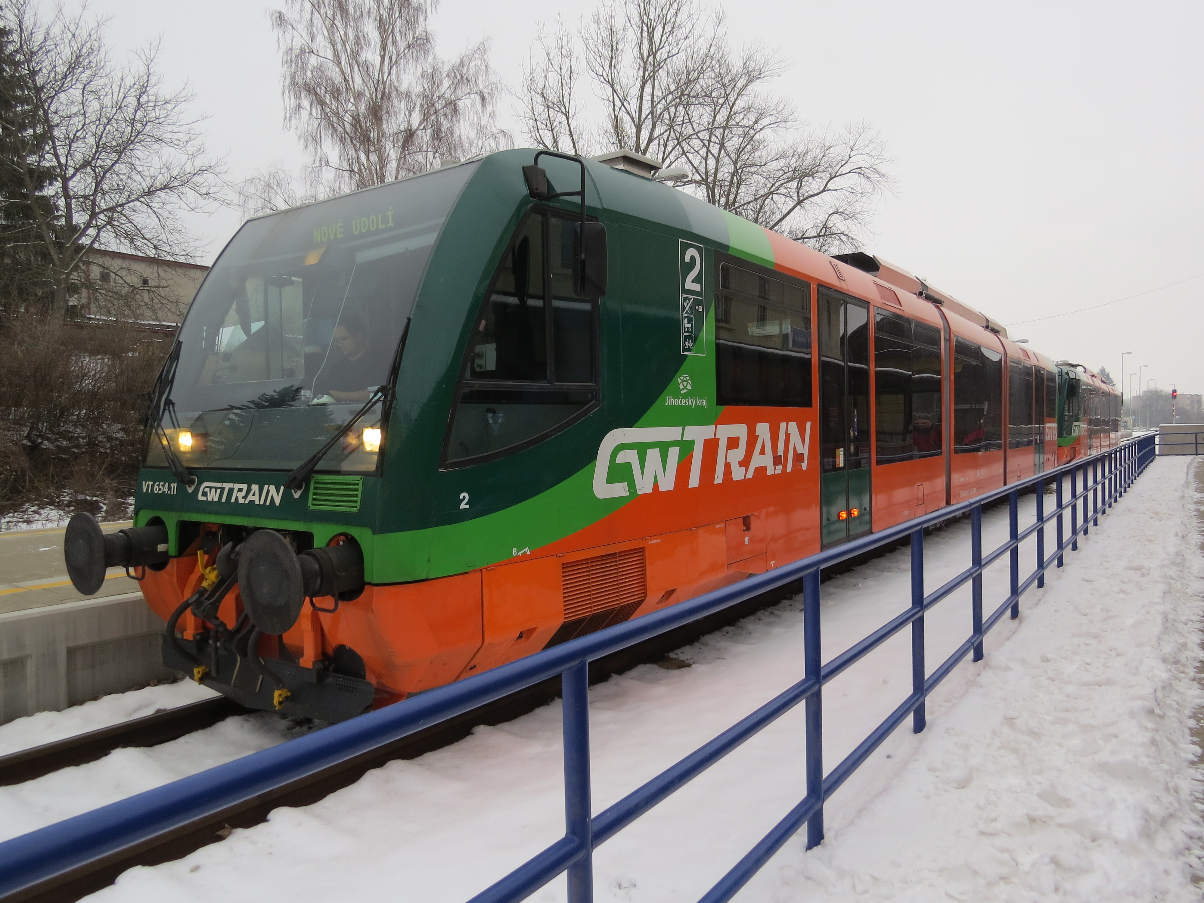 Český Krumlov